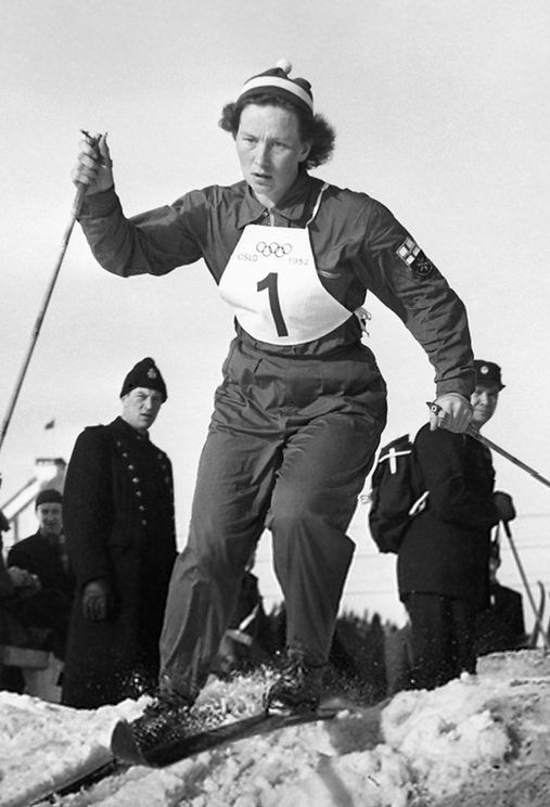 Sirkka Polkunen